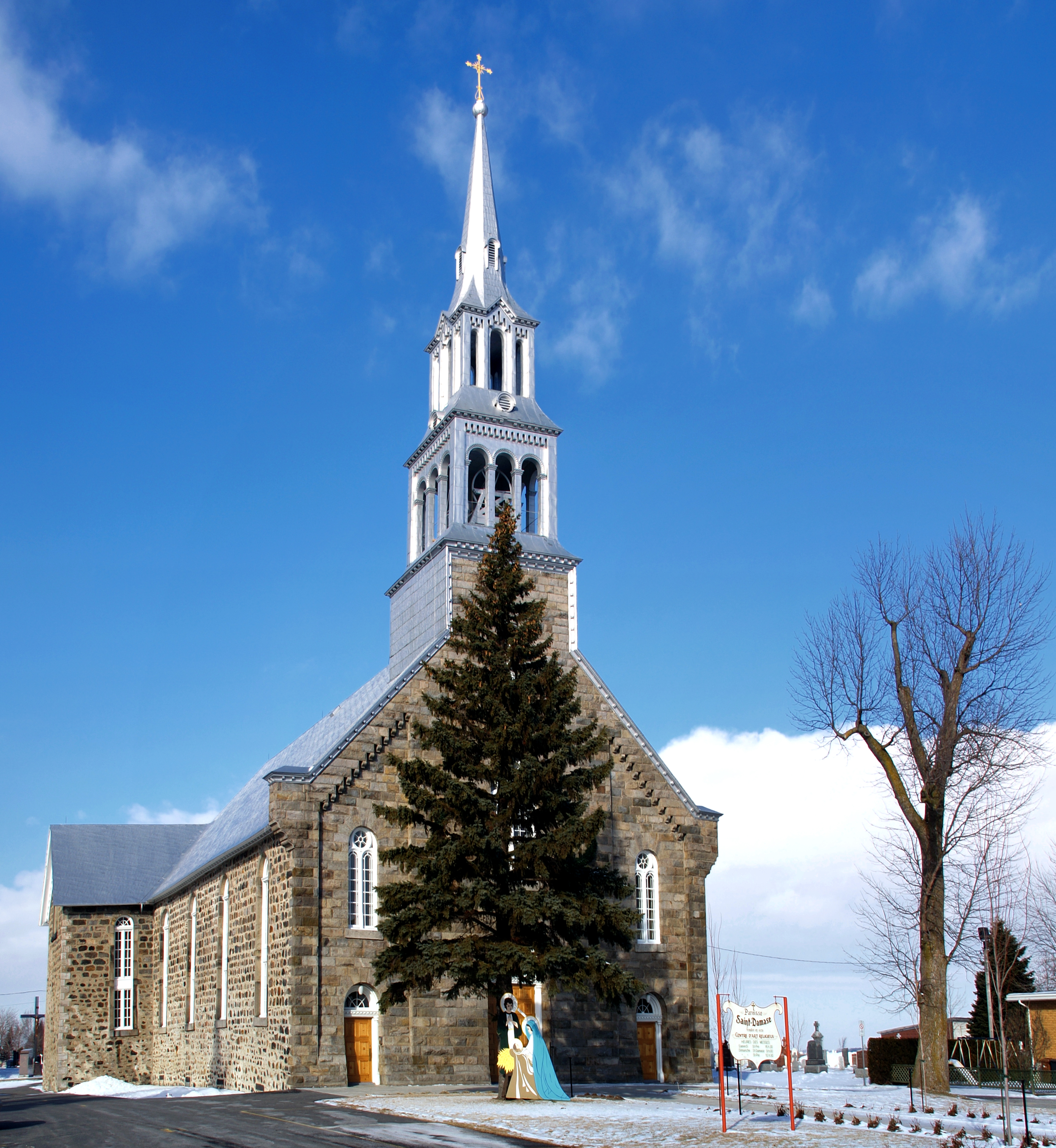 Saint-Damase, Montérégie (Québec) - Église Saint-Damase, 140 rue Principale